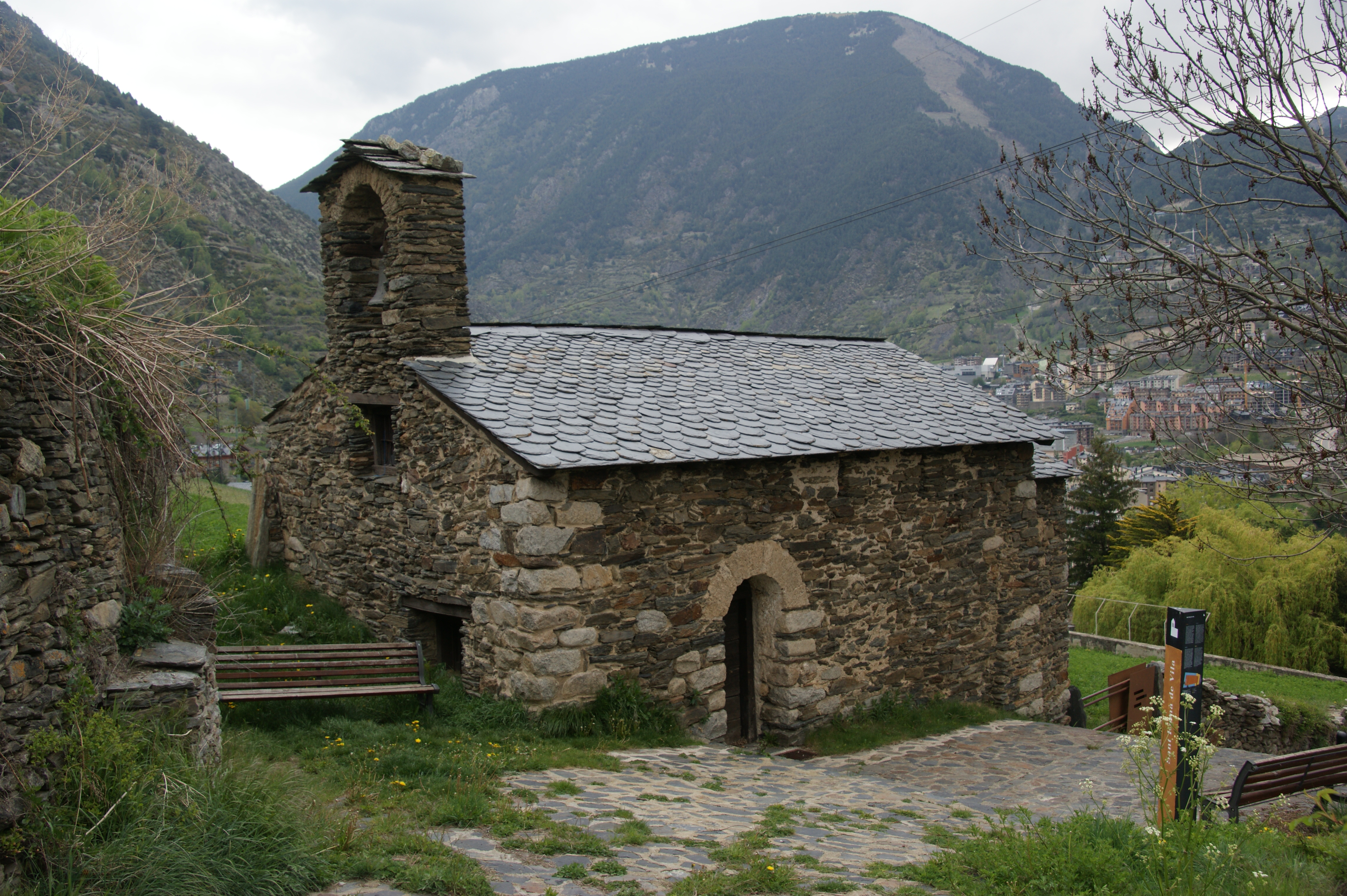 Església de Sant Romà de Vila